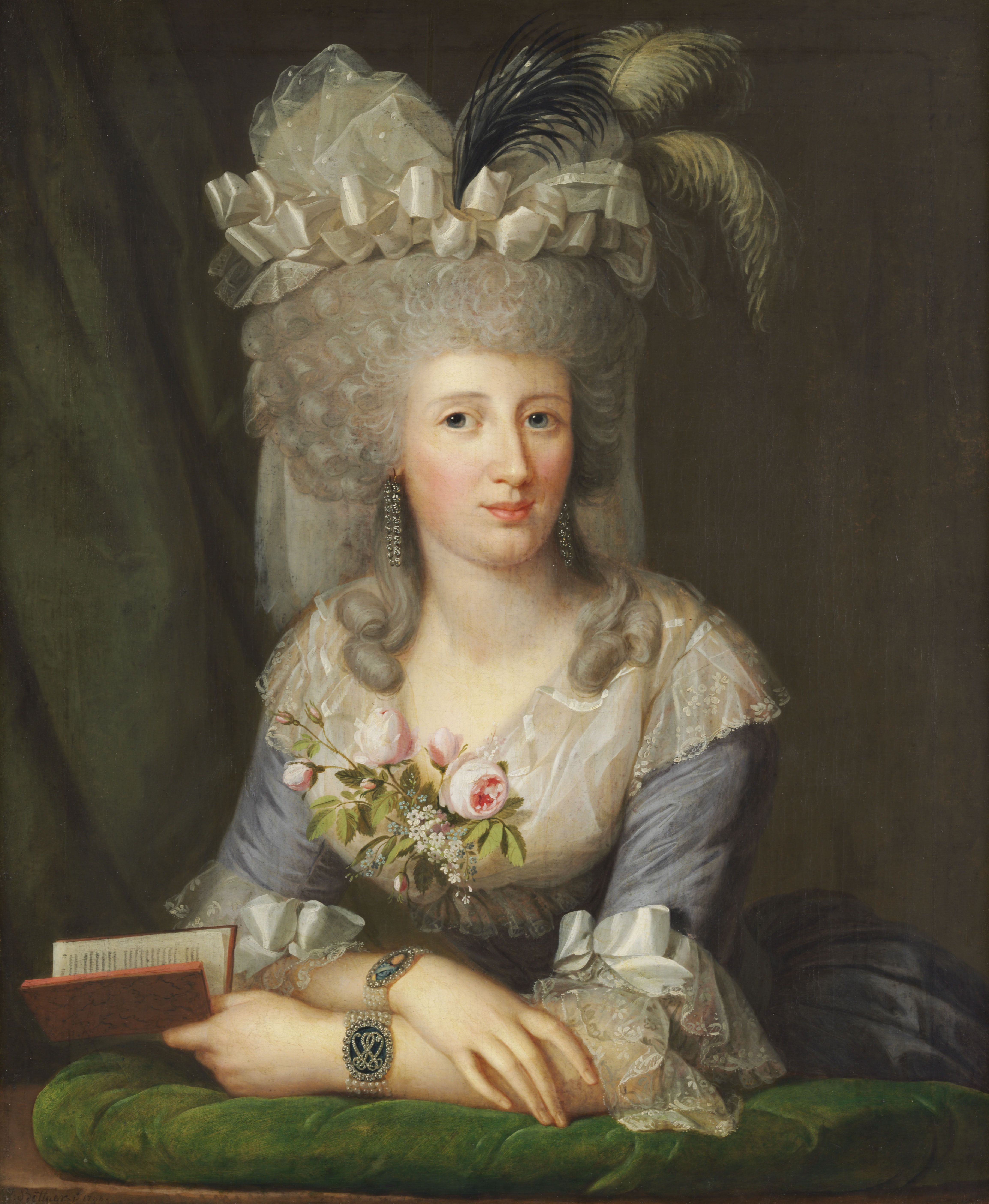 Gräfin K a r o l i n e (auch: Caroline) Juliane Albertine von Hessenstein (kaiserlich-österreichisch bestätigt 1811 -ihre Kinder mit dem hessischen Kurfürsten führten den gräflichen Titel von Hessenstein schon früher), seit 1788 Gräfin von Schlotheim (kaiserlich-österreichisch bestätigt 1811), geborene von Schlotheim, (* 6. Juli 1767, † 7. Januar 1847 in Kassel) 1788-1821 Mätresse des Landgrafen Wilhelm IX. von Hessen-Kassel (seit 1803: Kurfürst Wilhelm I. von Hessen) (* 3. Juni 1743, † 27. Februar 1821), Tochter des Christian Wilhelm von Schlotheim (Obrist, in russischen Kriegsdiensten gefallen) und der Friederike Most († 1799, einer Tochter des Kastellans von Wilhelmsthal)